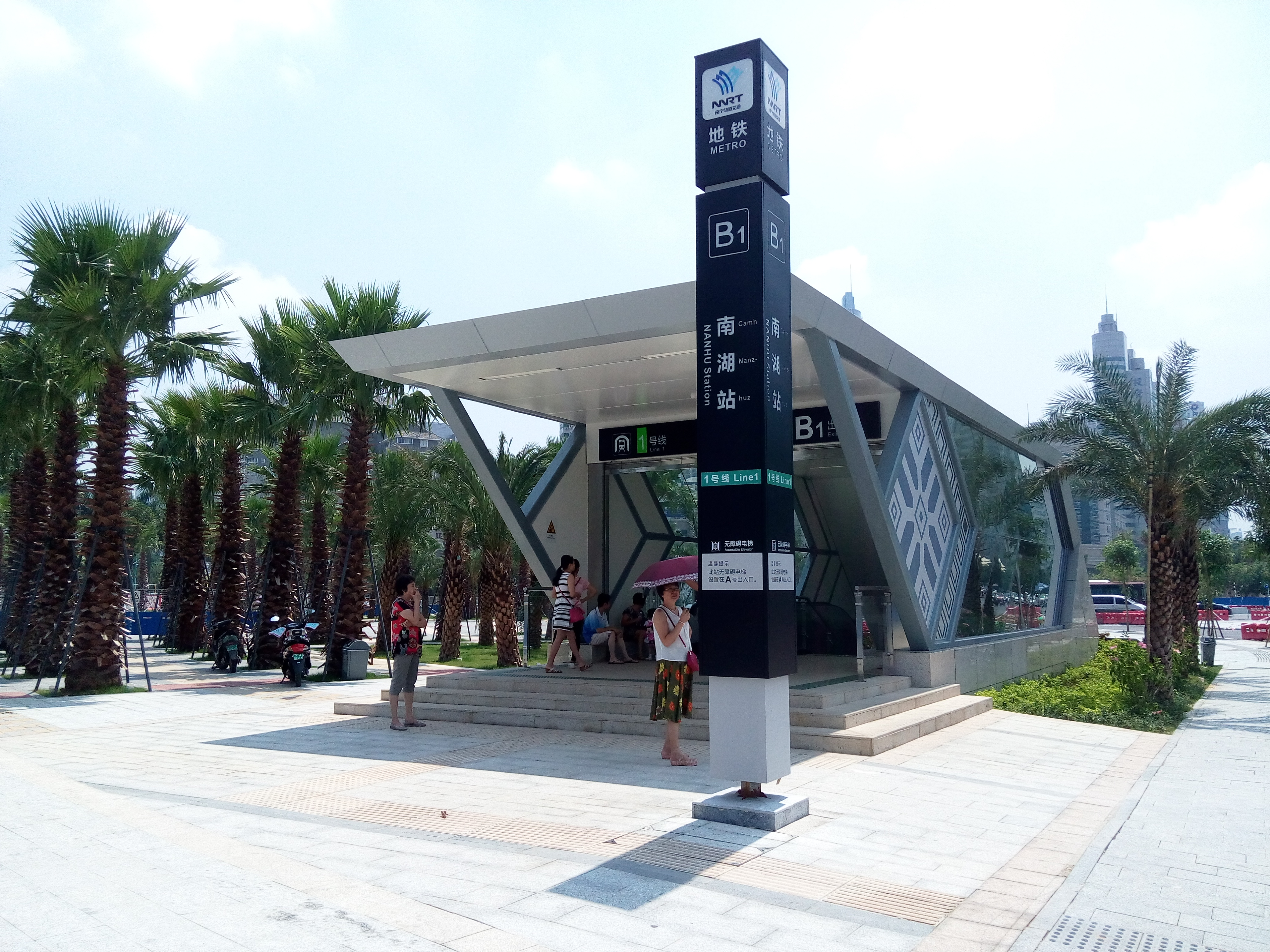 中文（中国大陆）: 南宁轨道交通